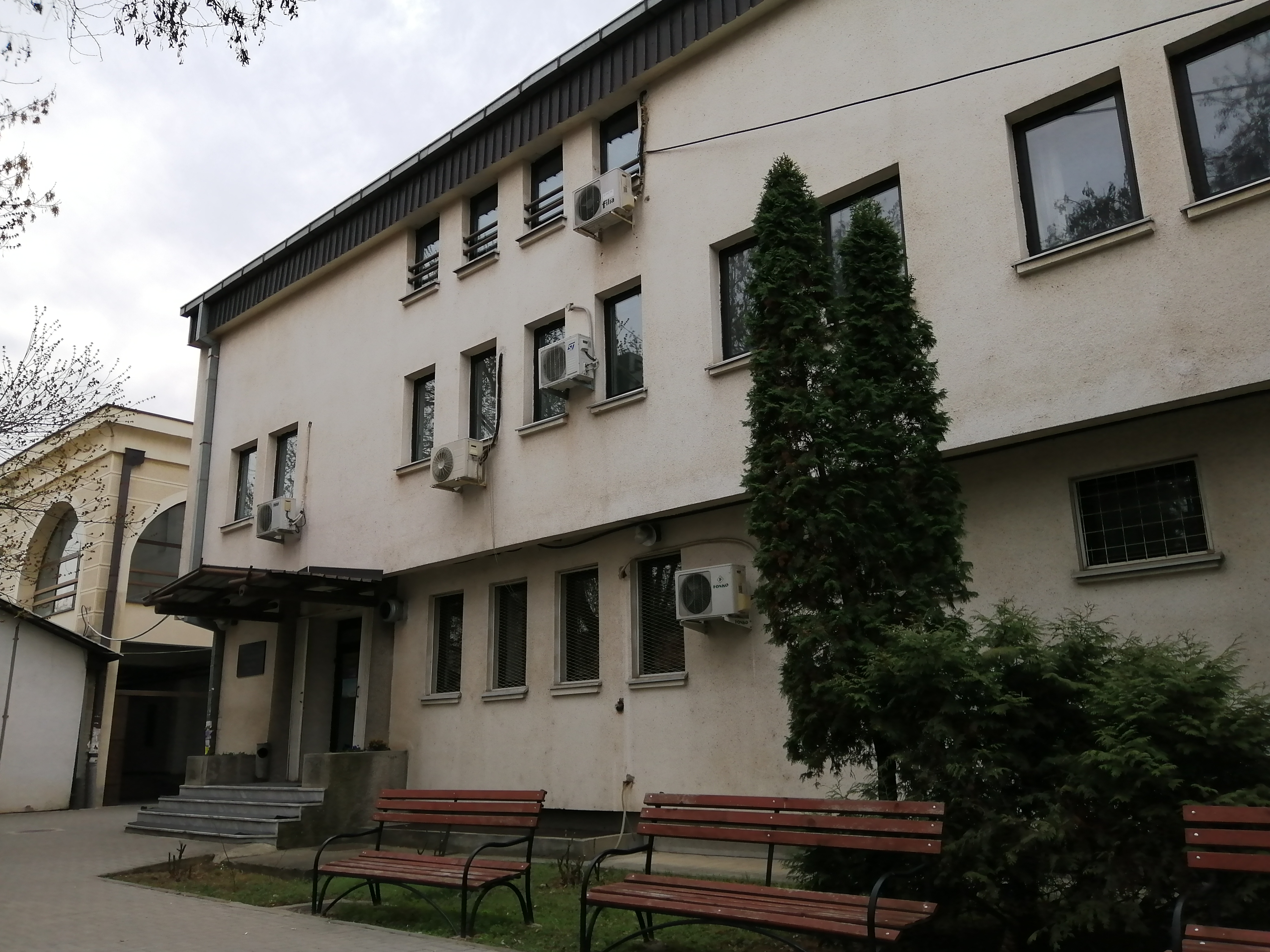 Фармацевтскиот факултет во Скопје